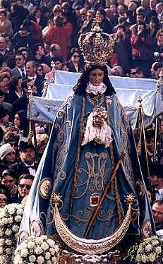 Virgen del Castillo, en Yecla (Murcia, España)